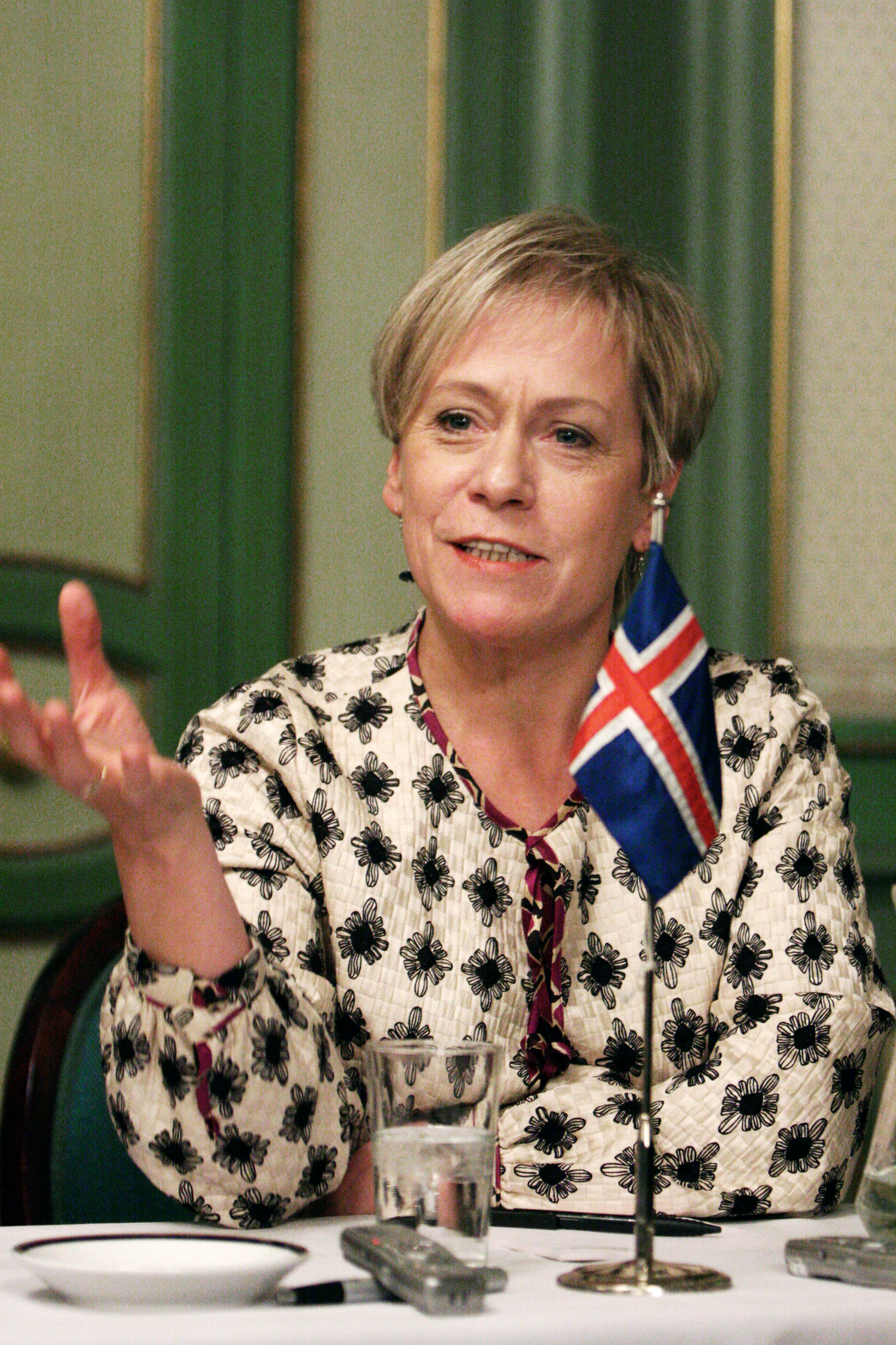 Islands utrikesminister Ingibjörg Sólrún Gísladóttir vid Nordiska Rådets session i Oslo. 2007-10-31. Foto: Magnus Fröderberg/norden.org